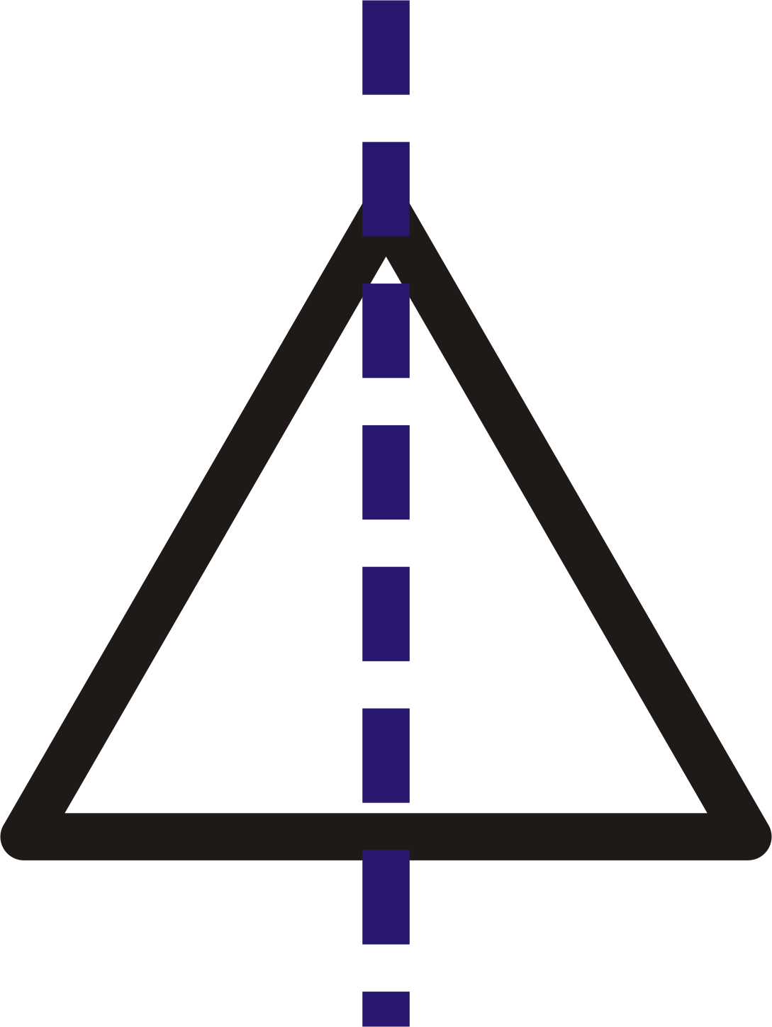 Semiesfericón. Esfericón de corte triangular